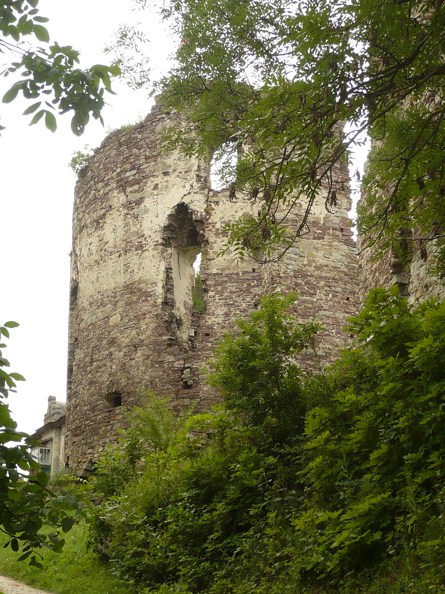 Buczacz. Zamek